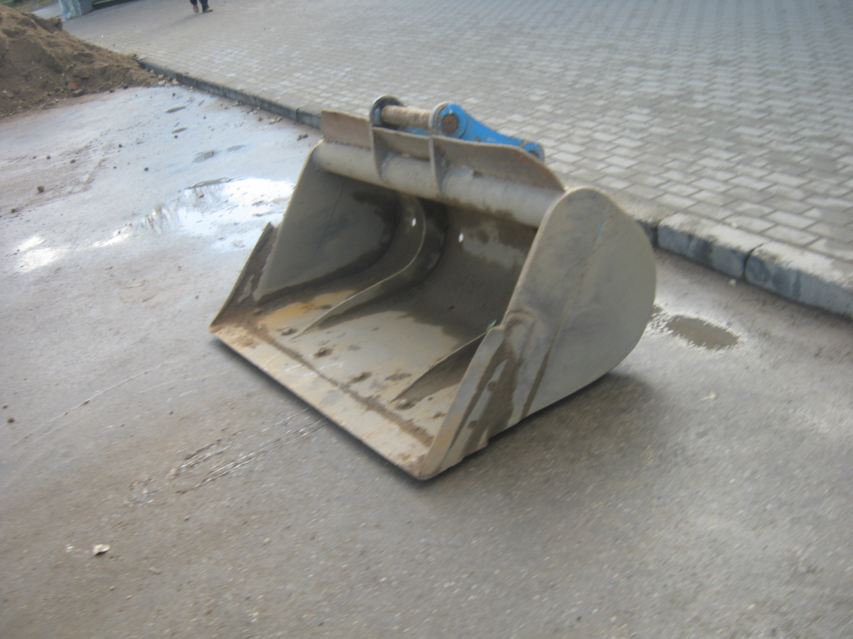 Jonava